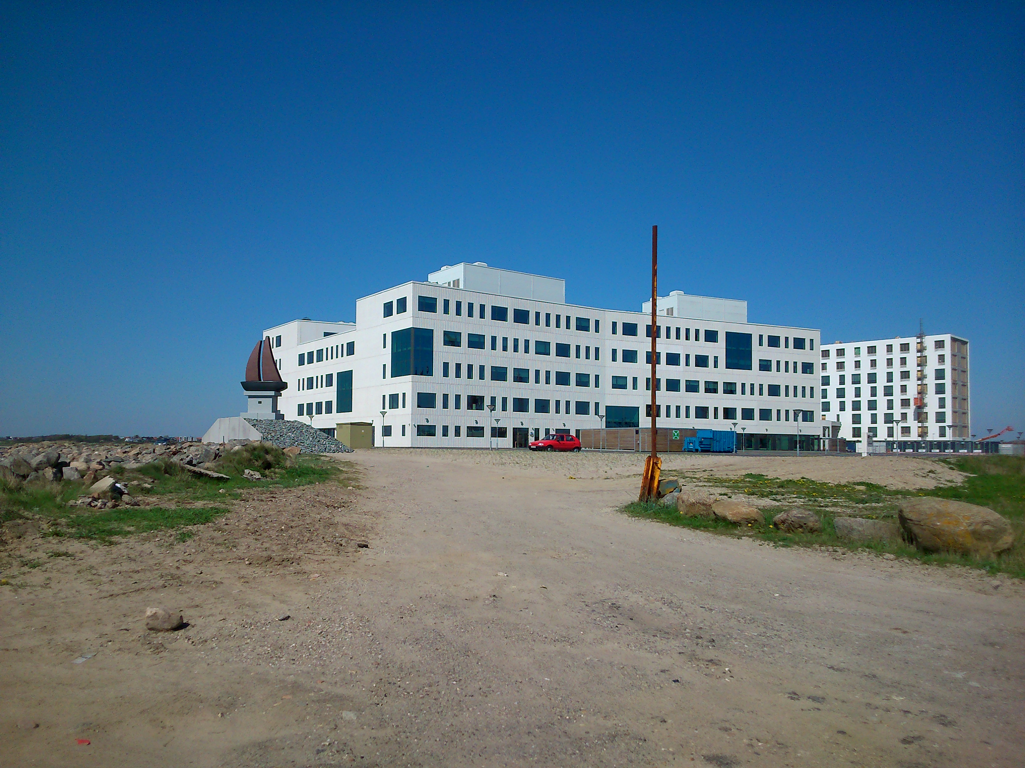 Semco Maritime domicil med kunstværket Skibet Esbjerg